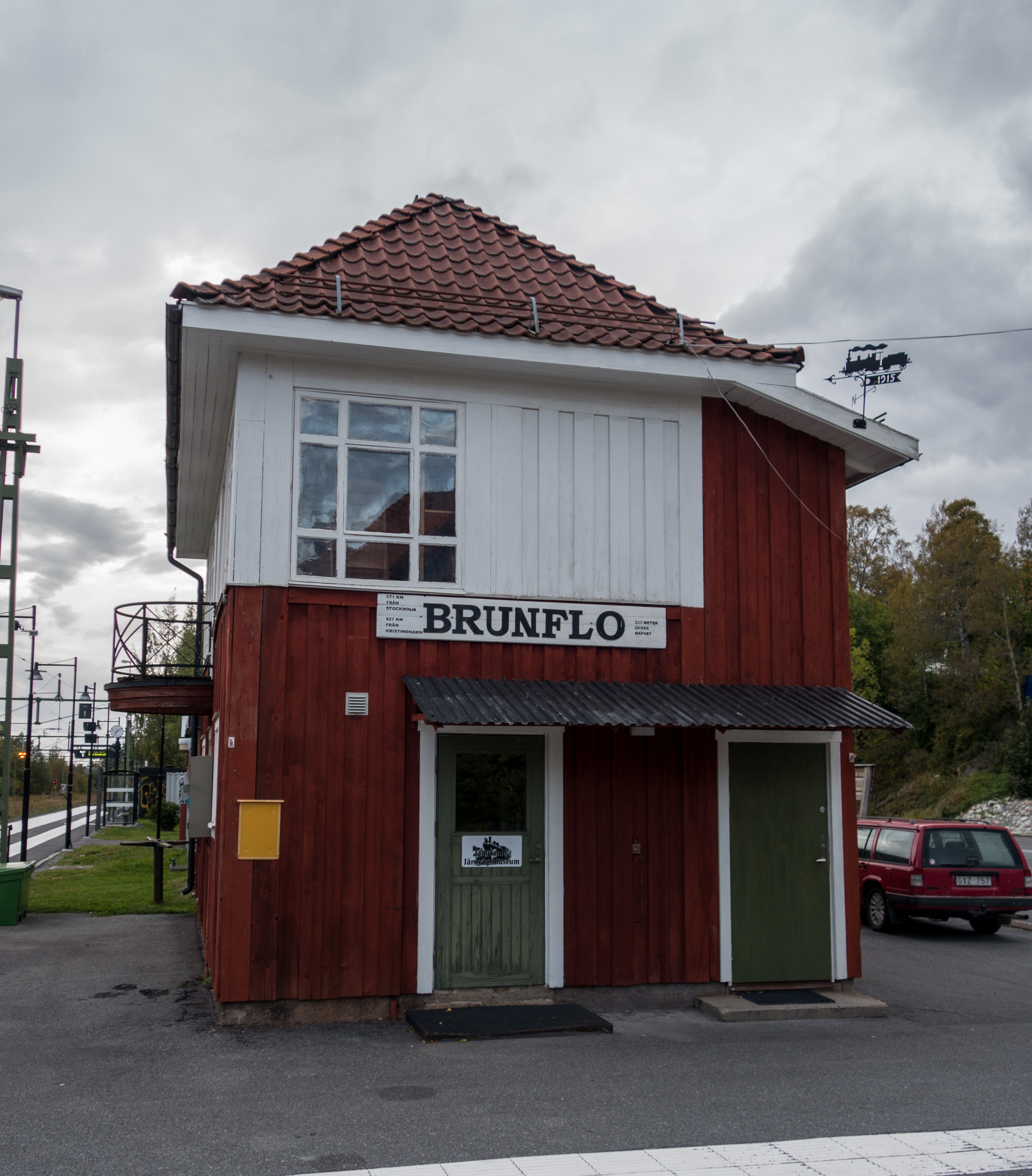 Järnvägsmuseiföreningen Jämtland. Östersund, Brunflo